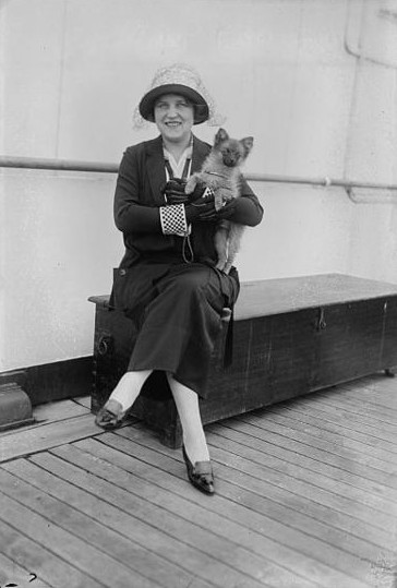 Claire Dux (1880 – 1967), German soprano